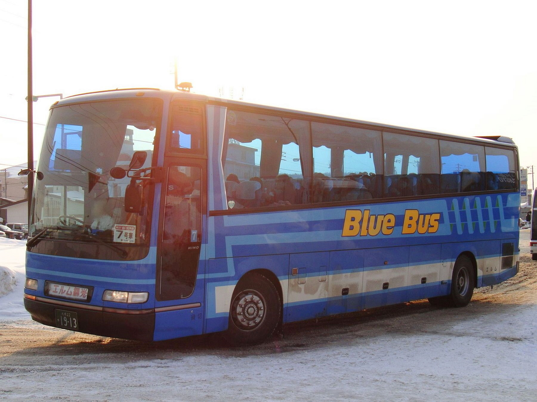 Blue Bus